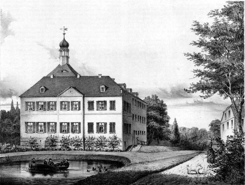 Herrenhaus des Ritterguts Plaußig, um 1860